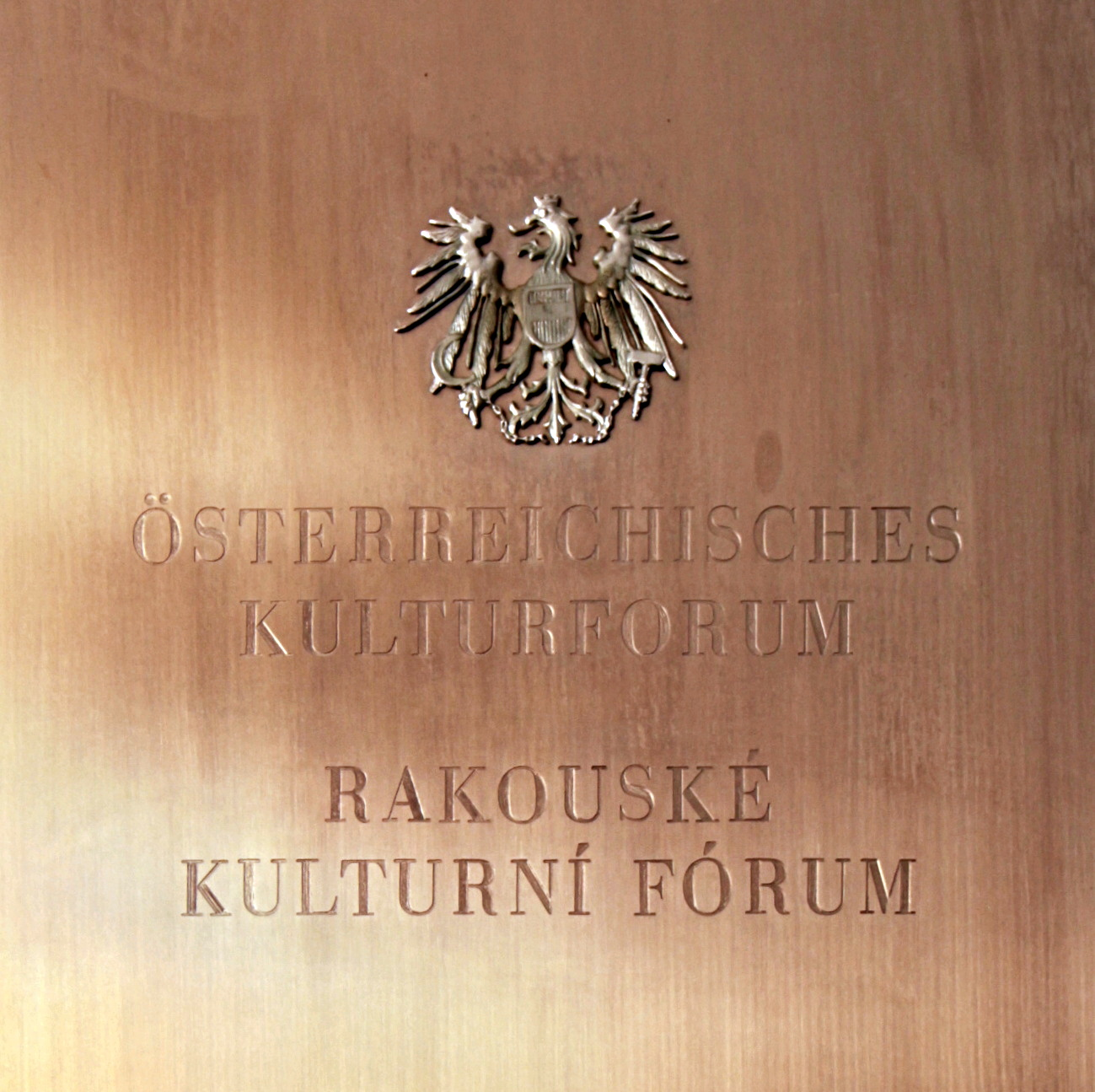 Jungmannovo náměstí